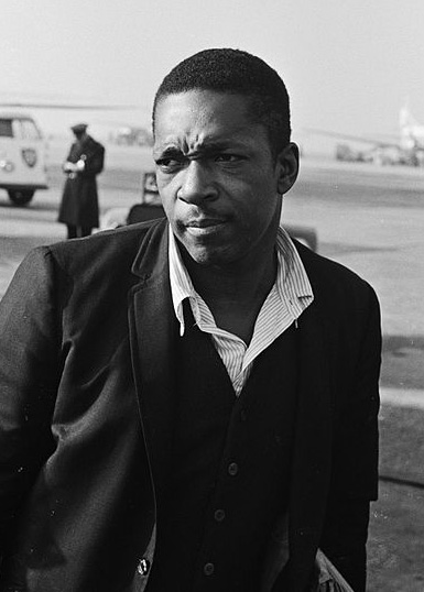 John Coltrane 1963